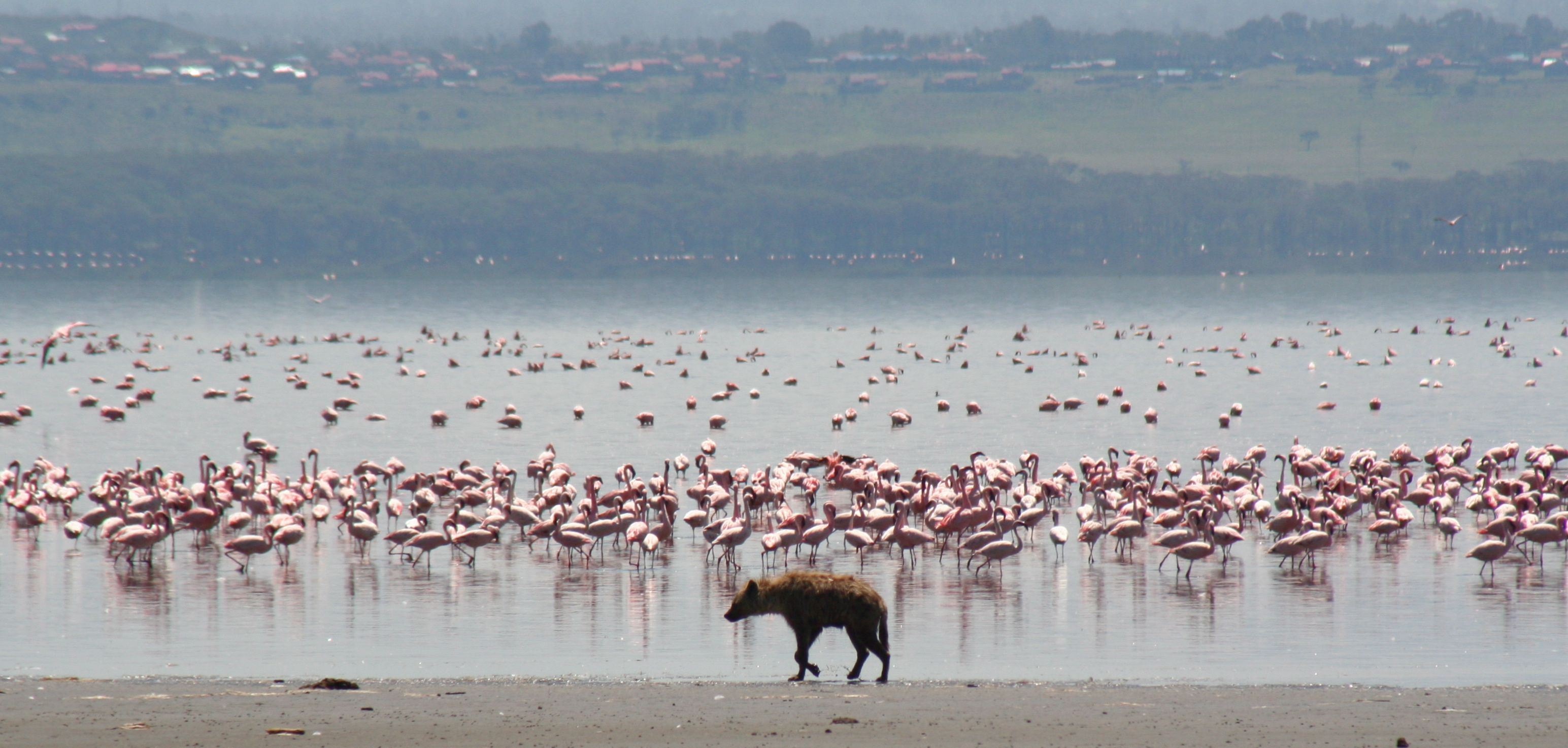 Spotted Hyena and Lesser Flamingos. Lake Nakuru National Park, Kenya.